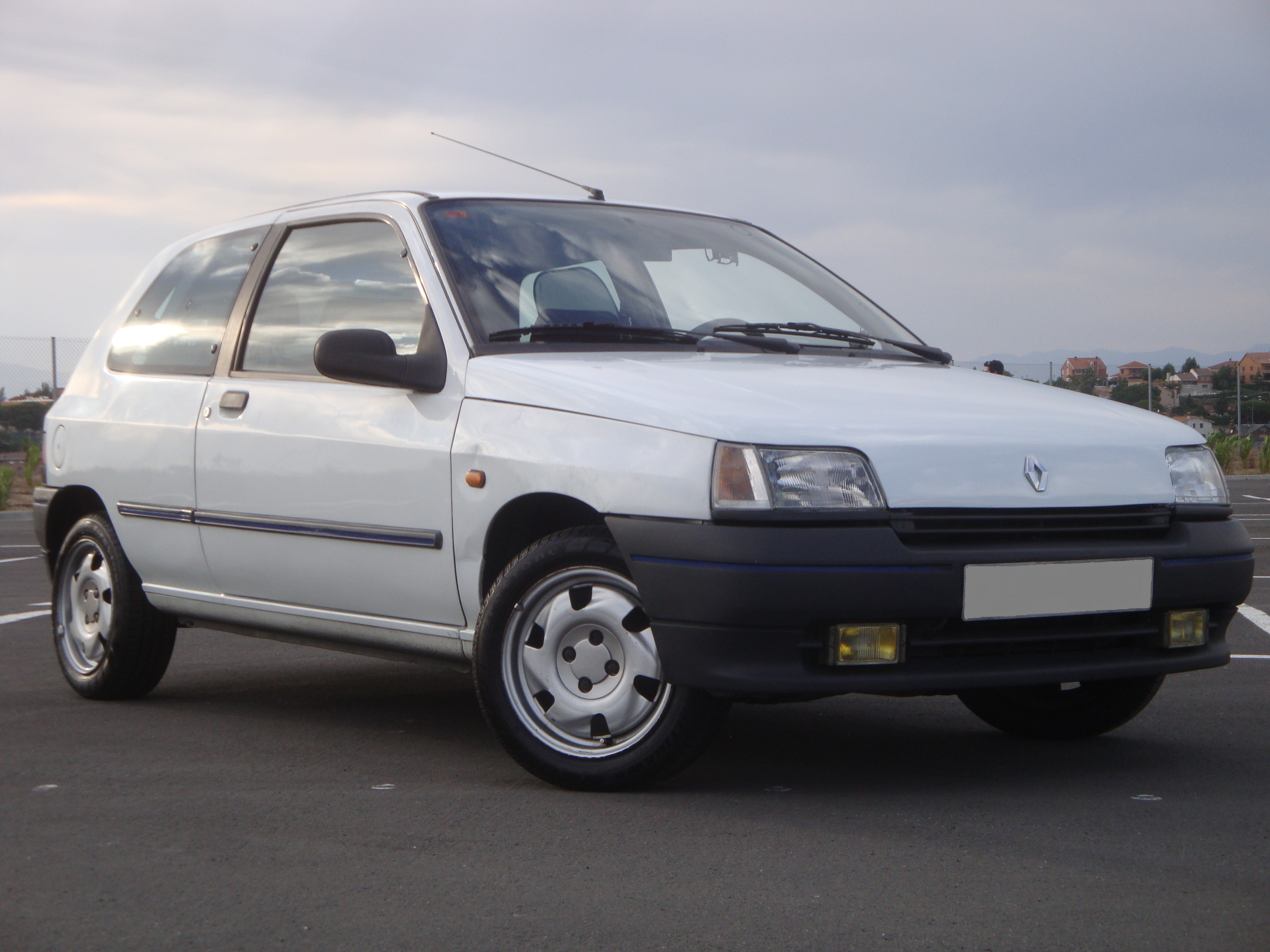 Renault Clio fase 1